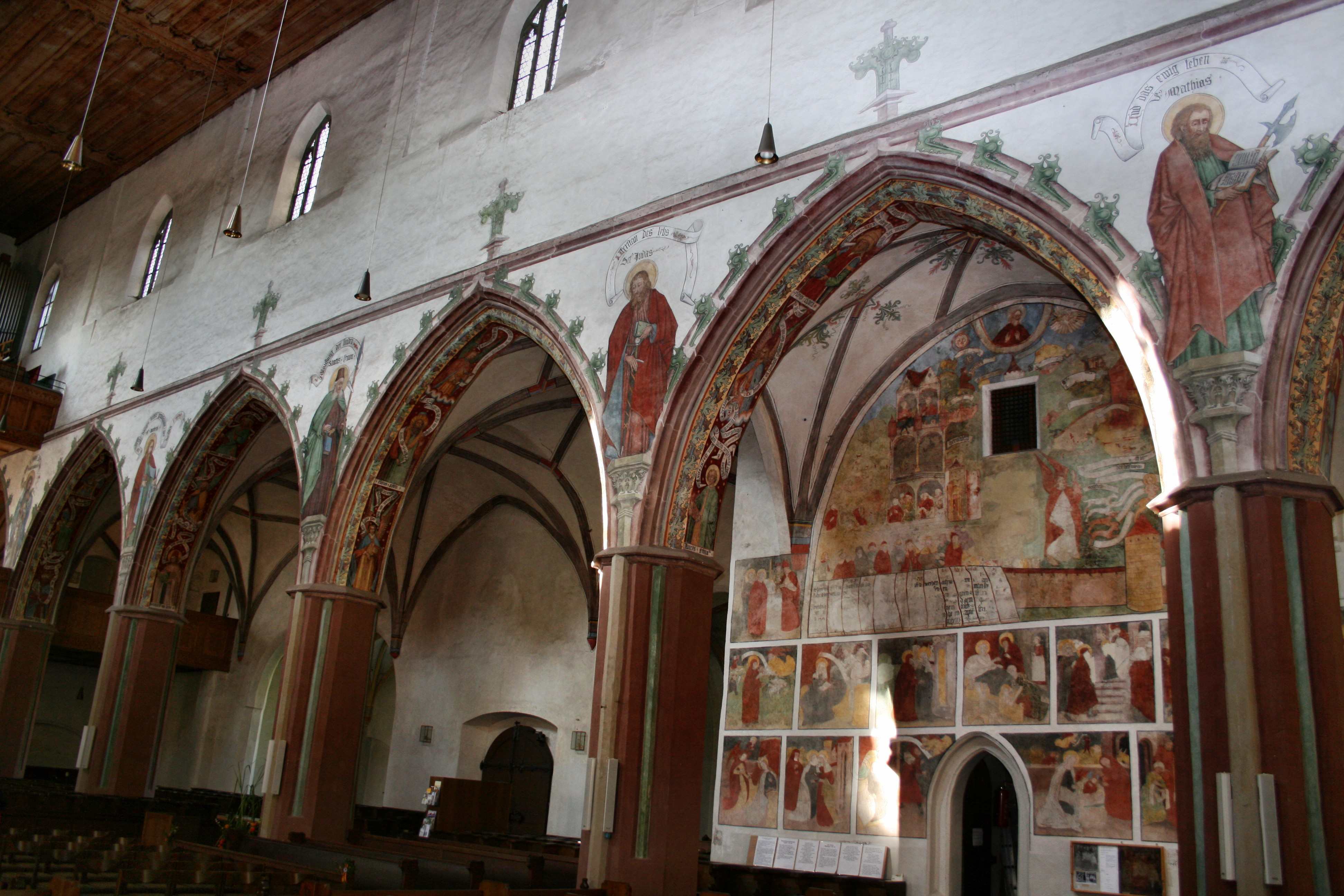 Unser Frauen in Memmingen, Freskenzyklus um 1465